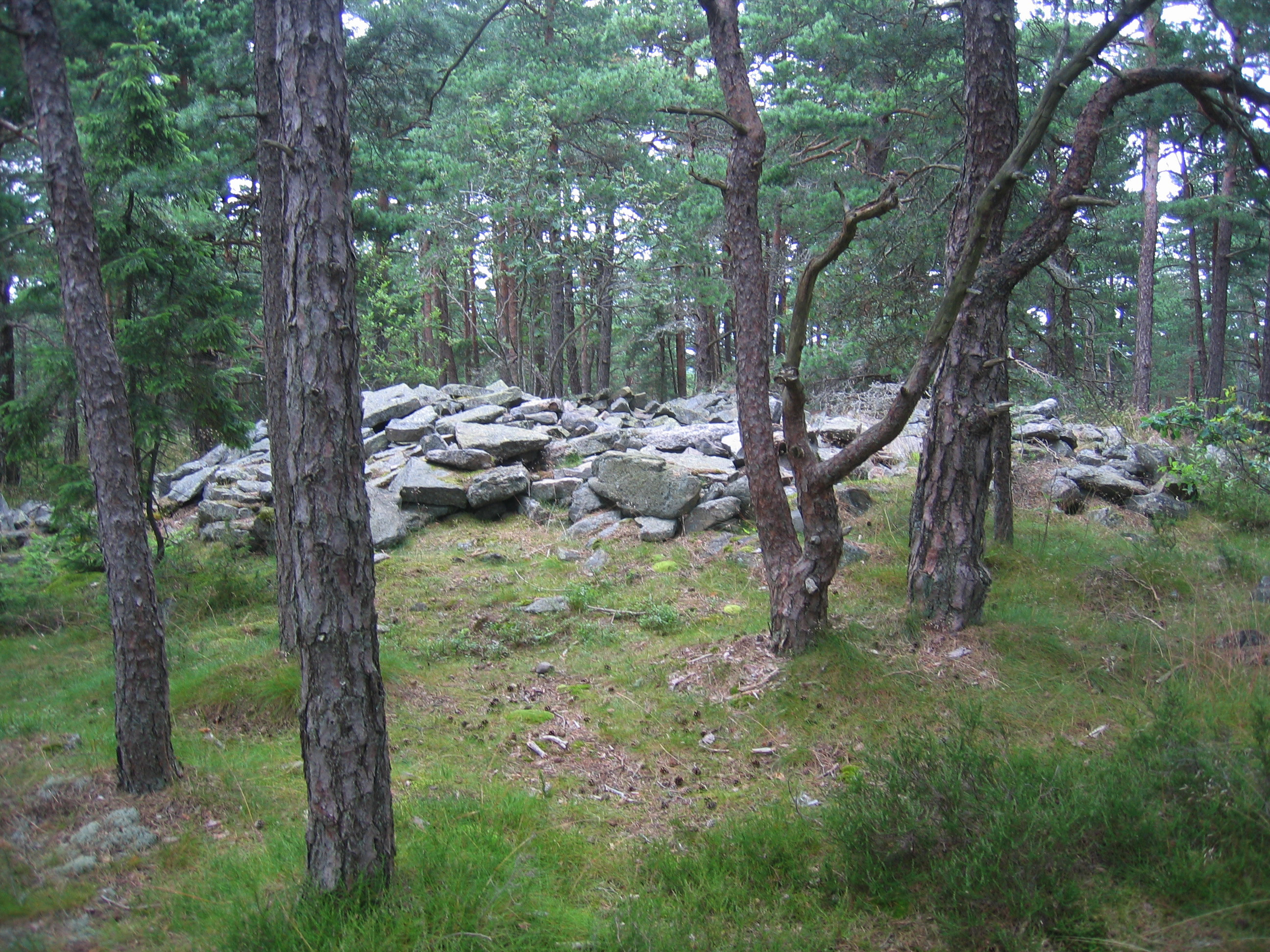 Gravrøys på Holtekjæråsen, Tjøme, Norway.